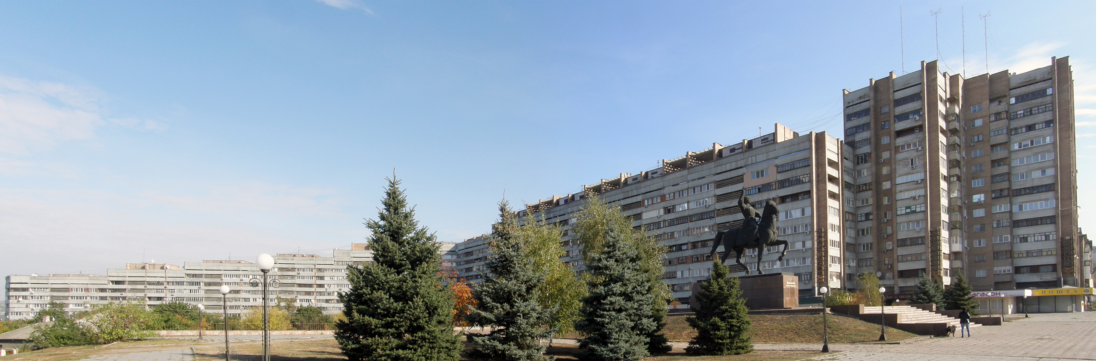 «Китайская стена», Луганск